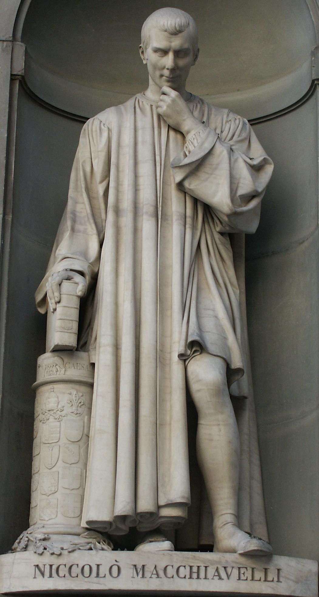 Statua di Niccolò Machiavelli, opera di Lorenzo Bartolini, sita a Firenze sulla facciata esterna degli Uffizi. Fotografata da Frieda (dillo a Ubi) il 18 settembre 2004.